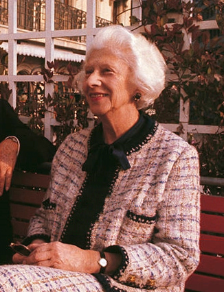 Vera Nabokov, Montreux, October 1969